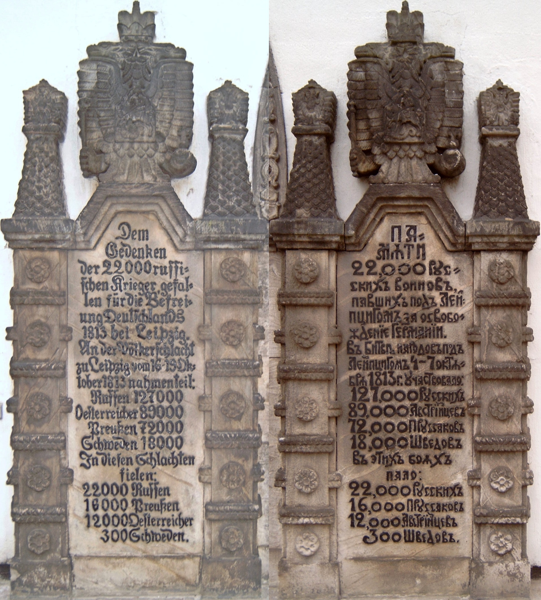 Kriegsgedächtnistafeln an der russischen Gedächtniskirche zu Leipzig, 12. Dezember 2004